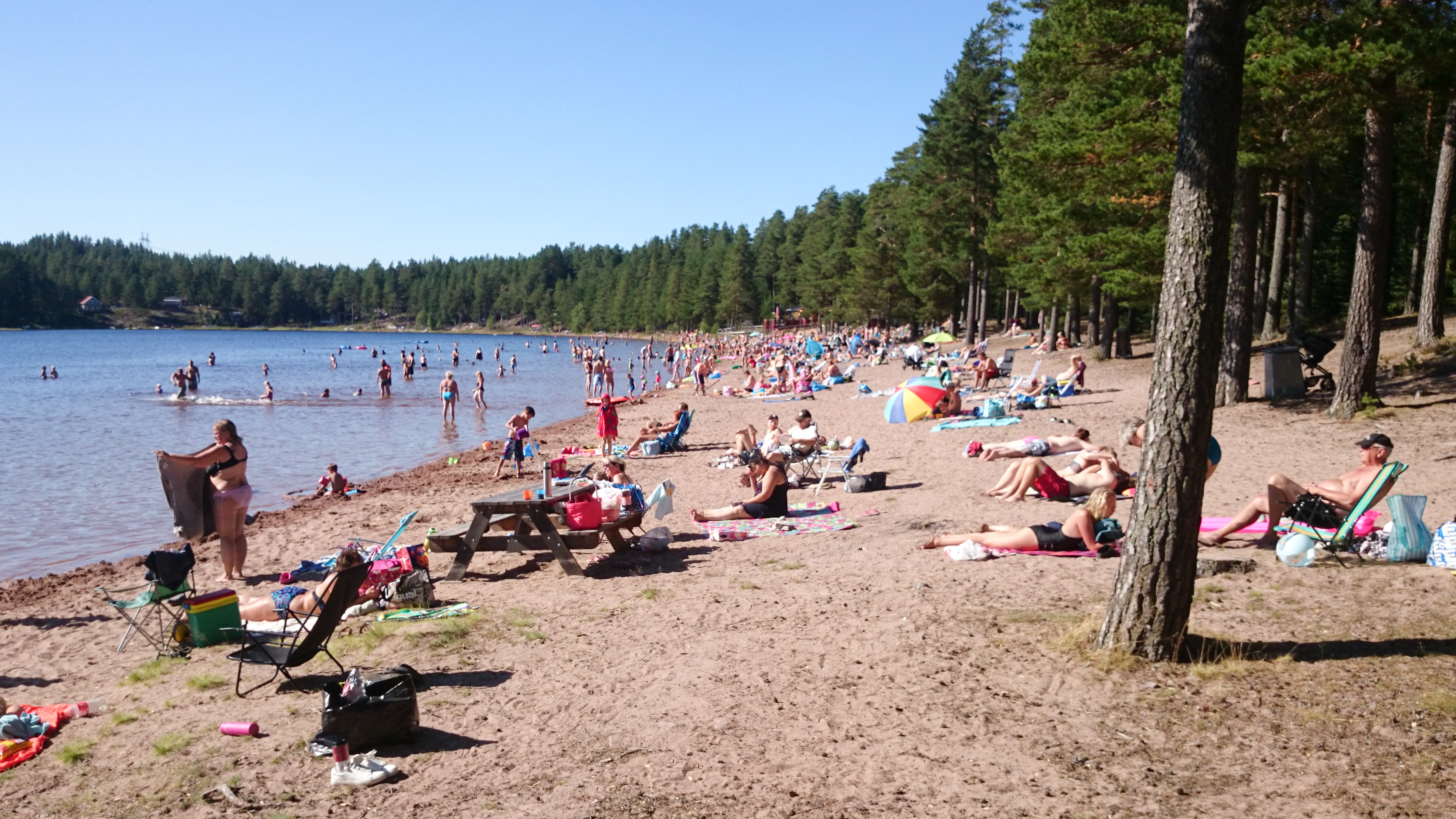 Badstranden vid Dammsjön, Säters kommun, Dalarnas län, Sverige